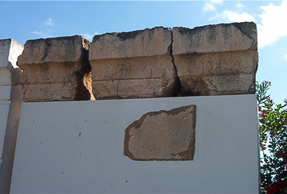 Fragments du sommet de la muraille punique, "quartier magon" de carthage